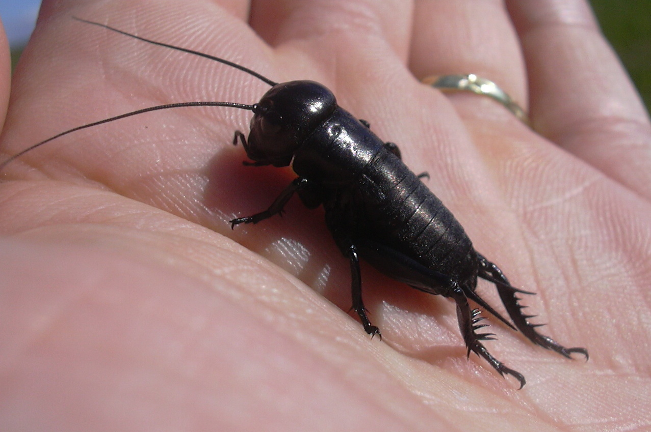 Cvrček polní = Gryllus campestris